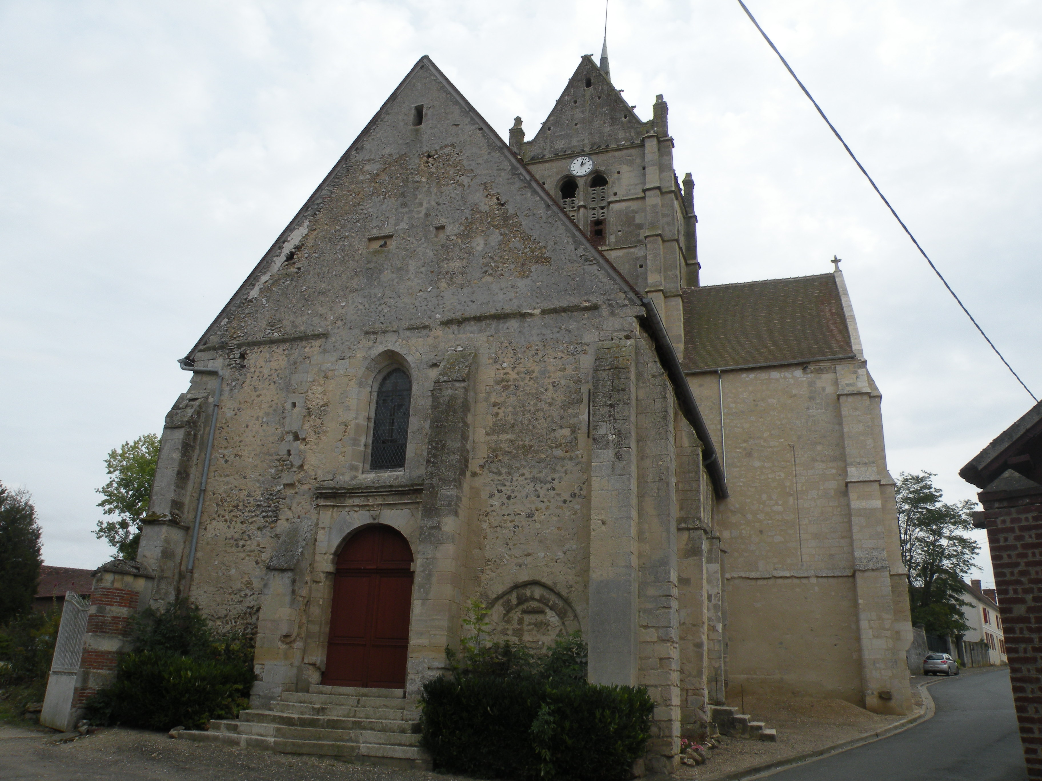 Église Notre-Dame-de-l'Assomption de Fresne-Léguillon